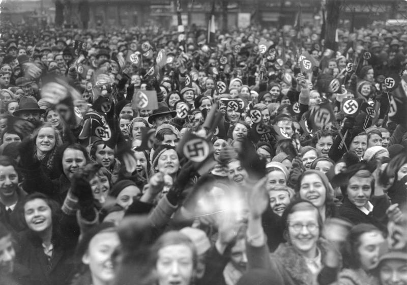 Die Volksabstimmung an der Saar am 13. Januar 1935. Ankunft der Berliner Abstimmungsberechtigten nach der Abstimmung auf dem Potsdamer Bahnhof in Berlin.